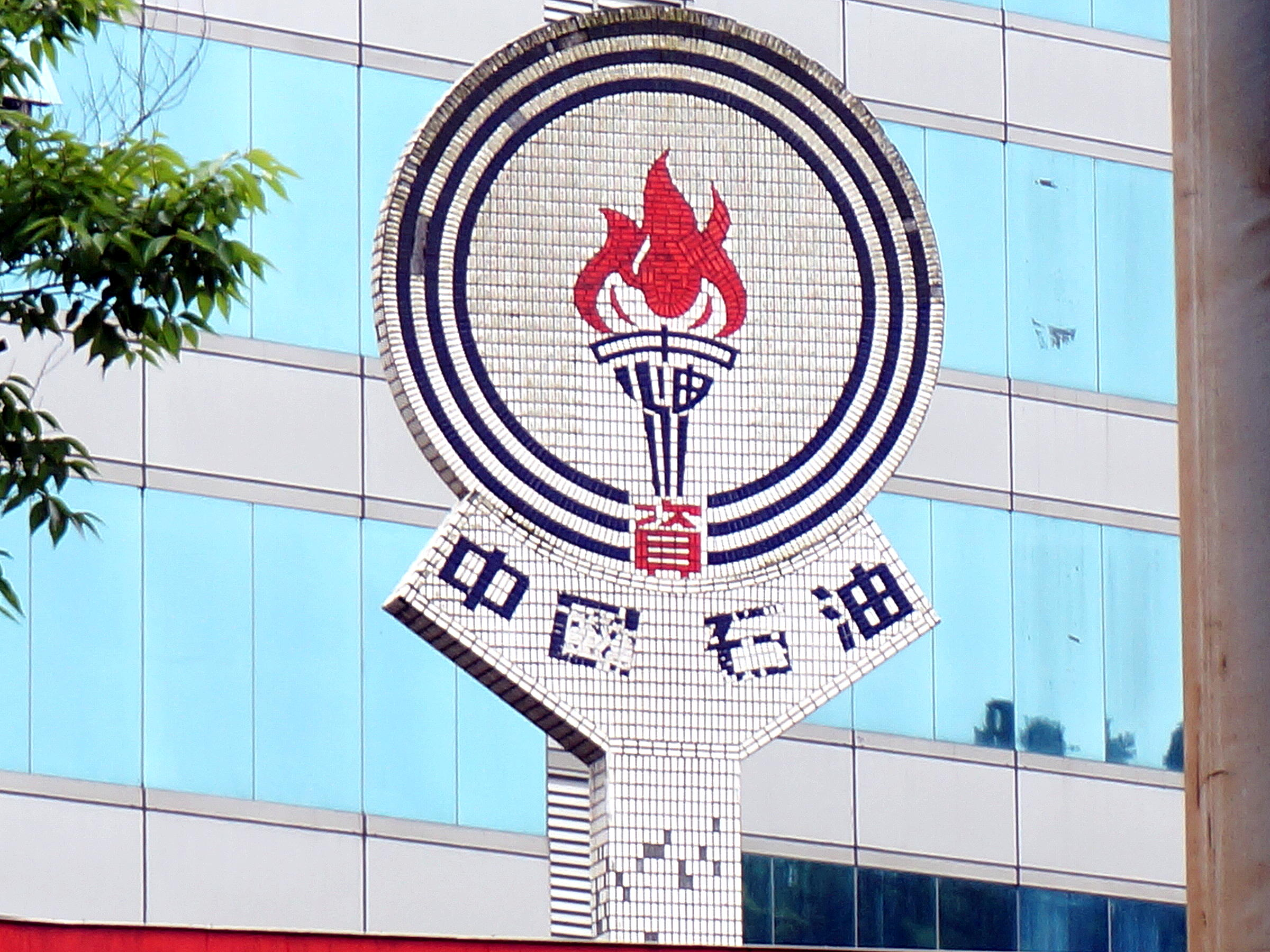 台灣中油保長坑站頂樓的中油標誌石碑，中油標誌及其下方「中國石油」四字係以瓷磚拼貼而成。「國石」二字於2007年2月被以白色瓷磚蓋掉，如今又出現。